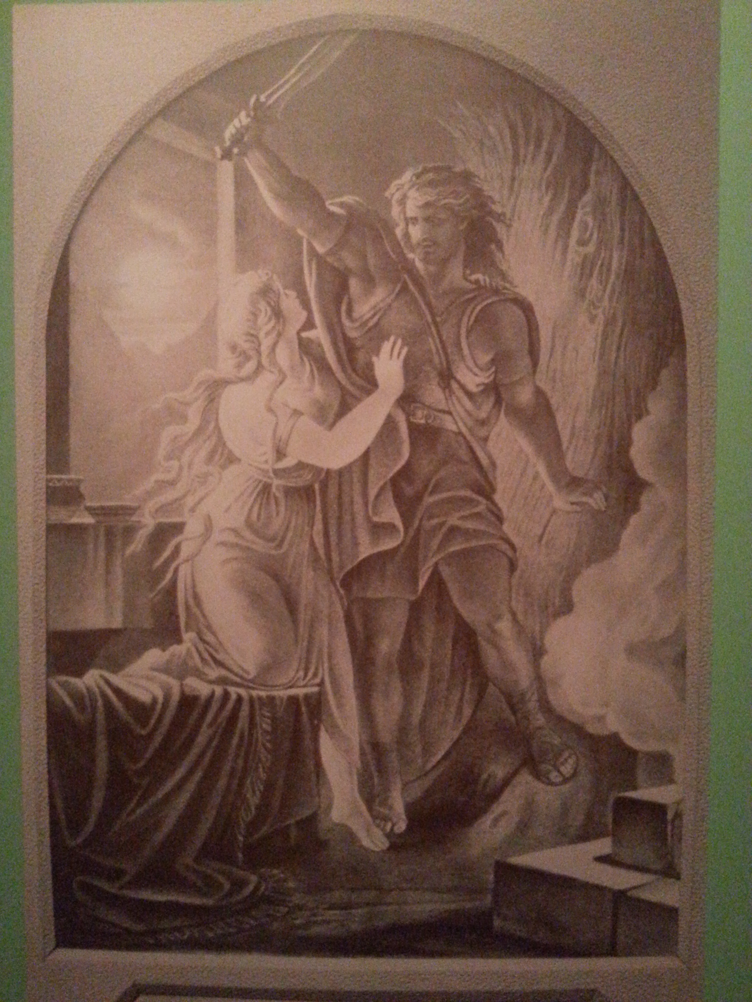 Nibelungengang in der Münchner Residenz, Bayern. (1944 durch Bombenangriffe zerstört)